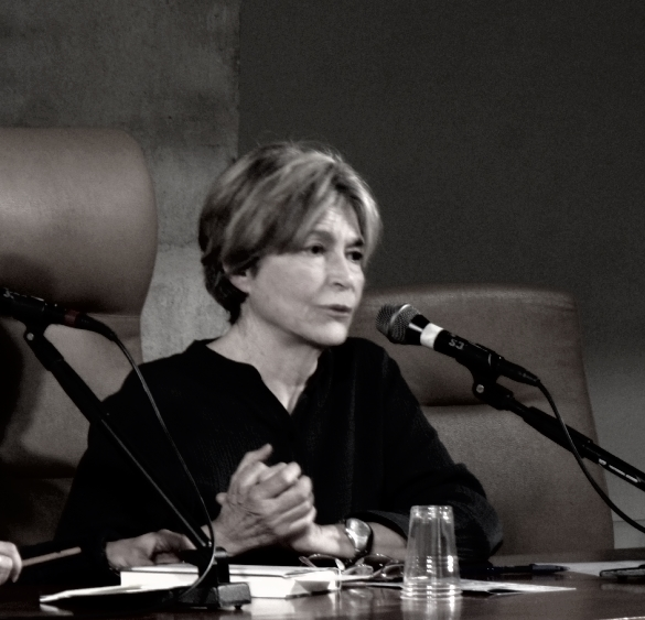 Carla Vistarini al Festival di Cinema e Poesia "Versi di Luce".